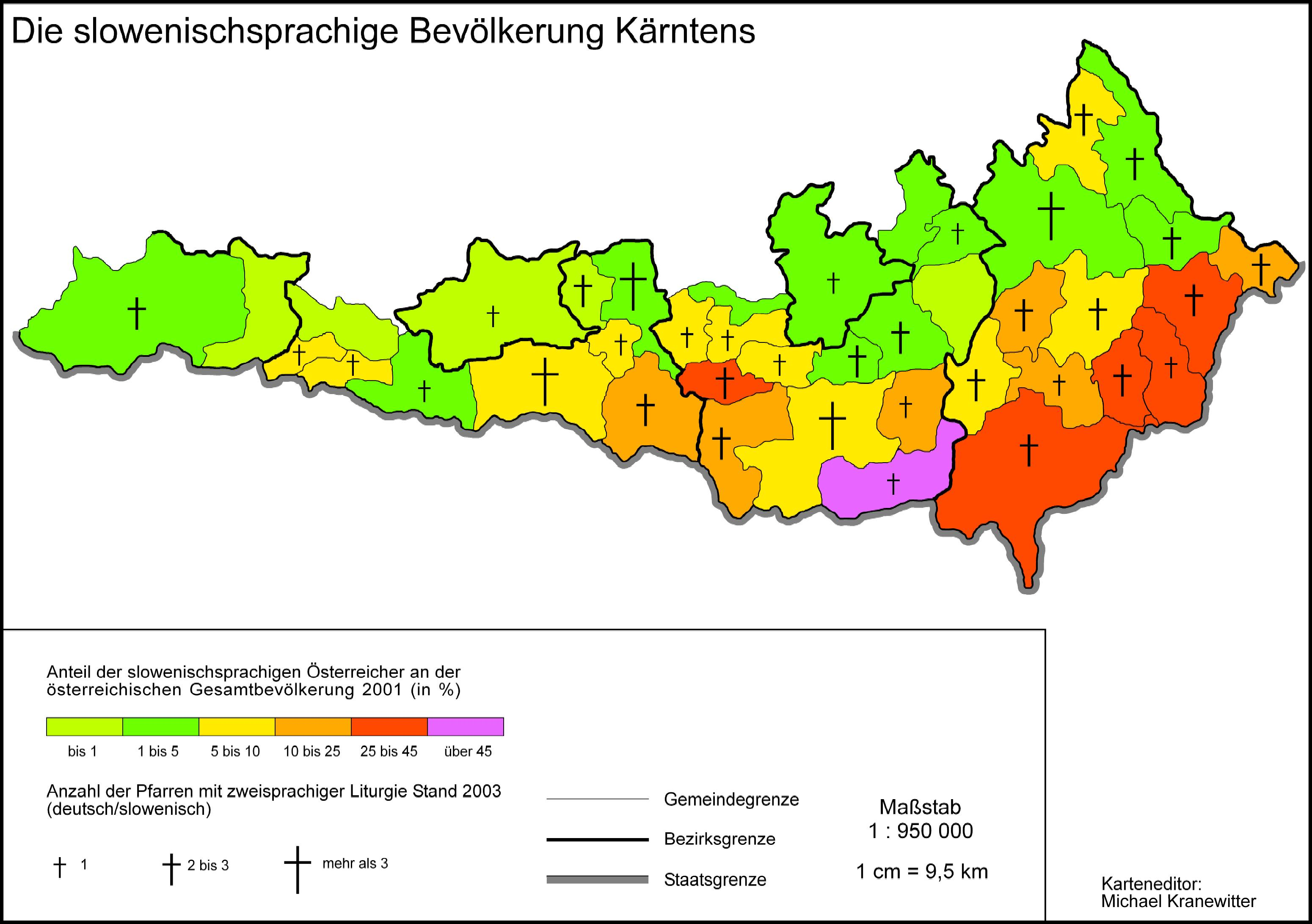 Anteil der slowenischsprachigen Bevölkerung Kärntens 2001 sowie Anzahl der PFarren mit slowenischsprachiger Liturgie 2003.